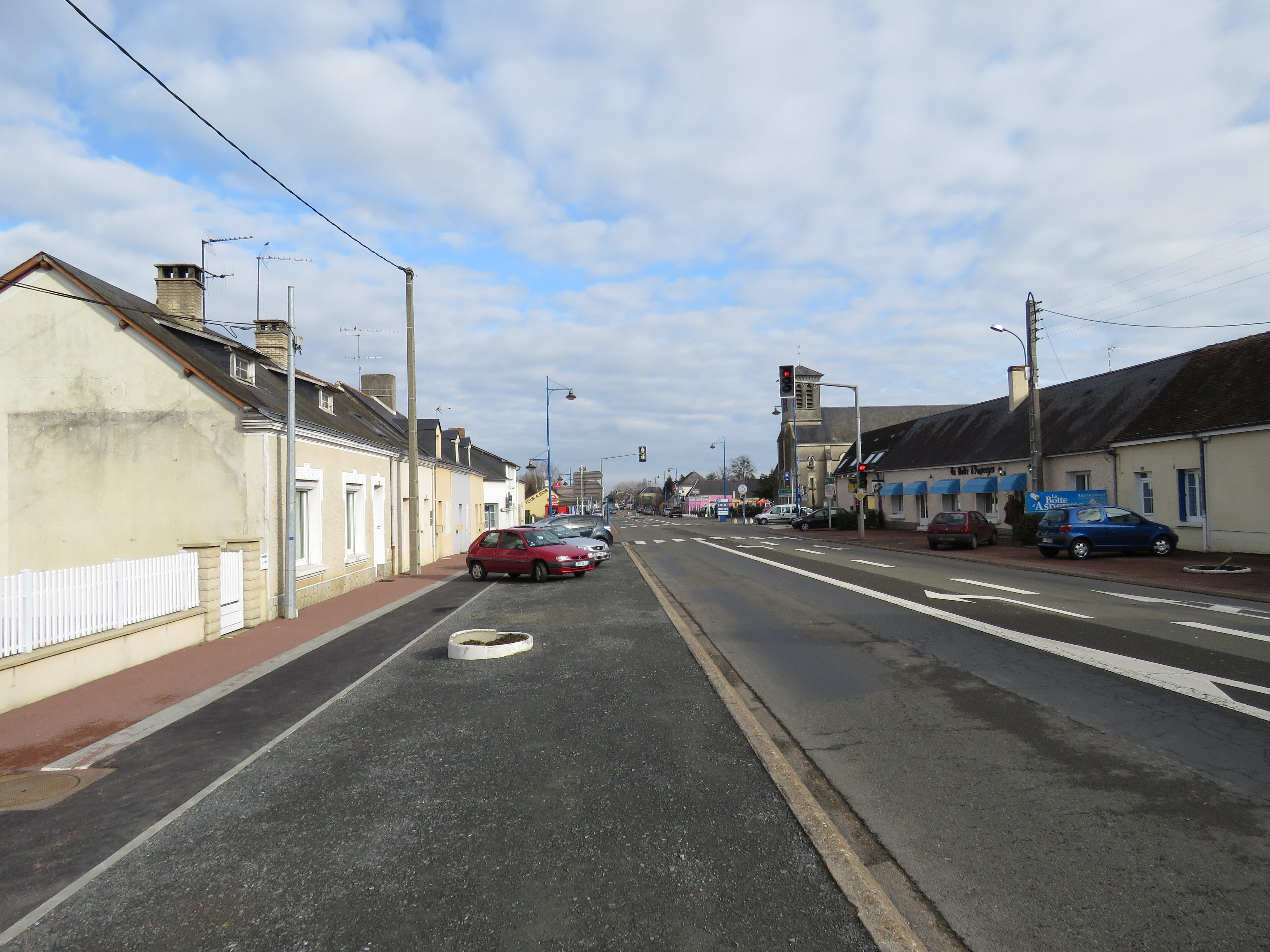 La nationale traversant Guécélard.